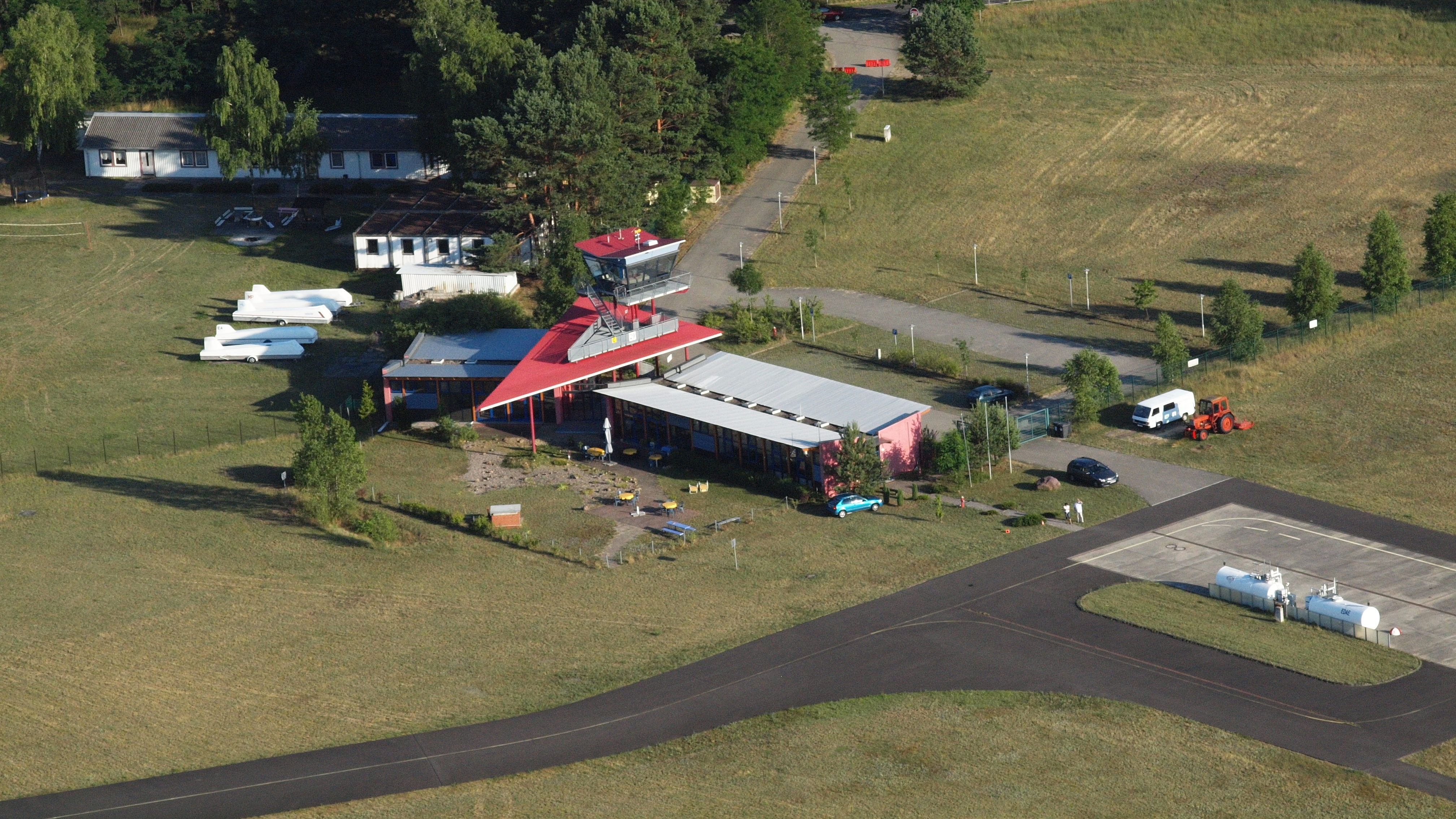 Eisenhüttenstadt, Flugplatz, Luftaufnahme (2015)